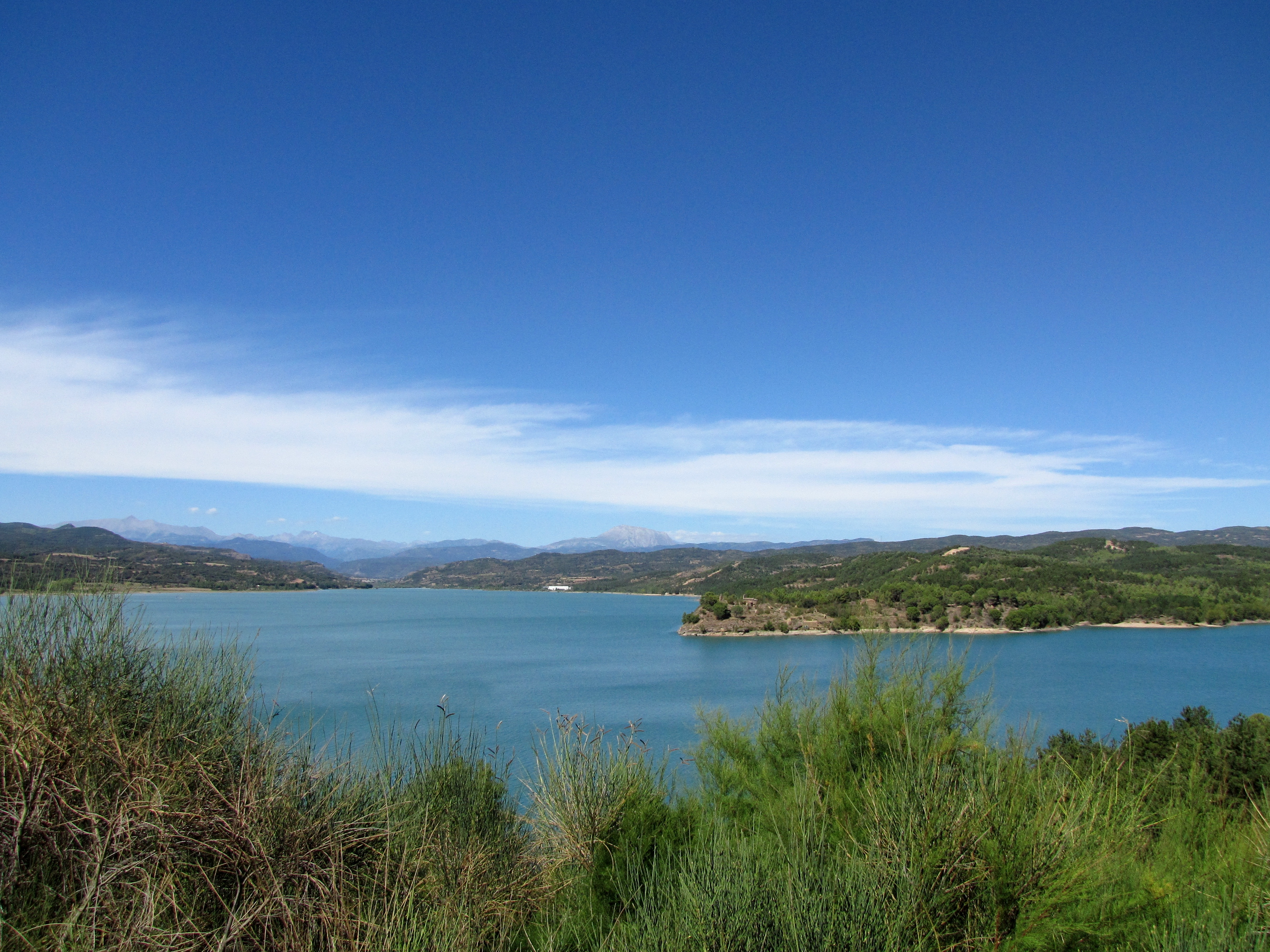 Embalse de Barasona (Graus) -Huesca- Aragón